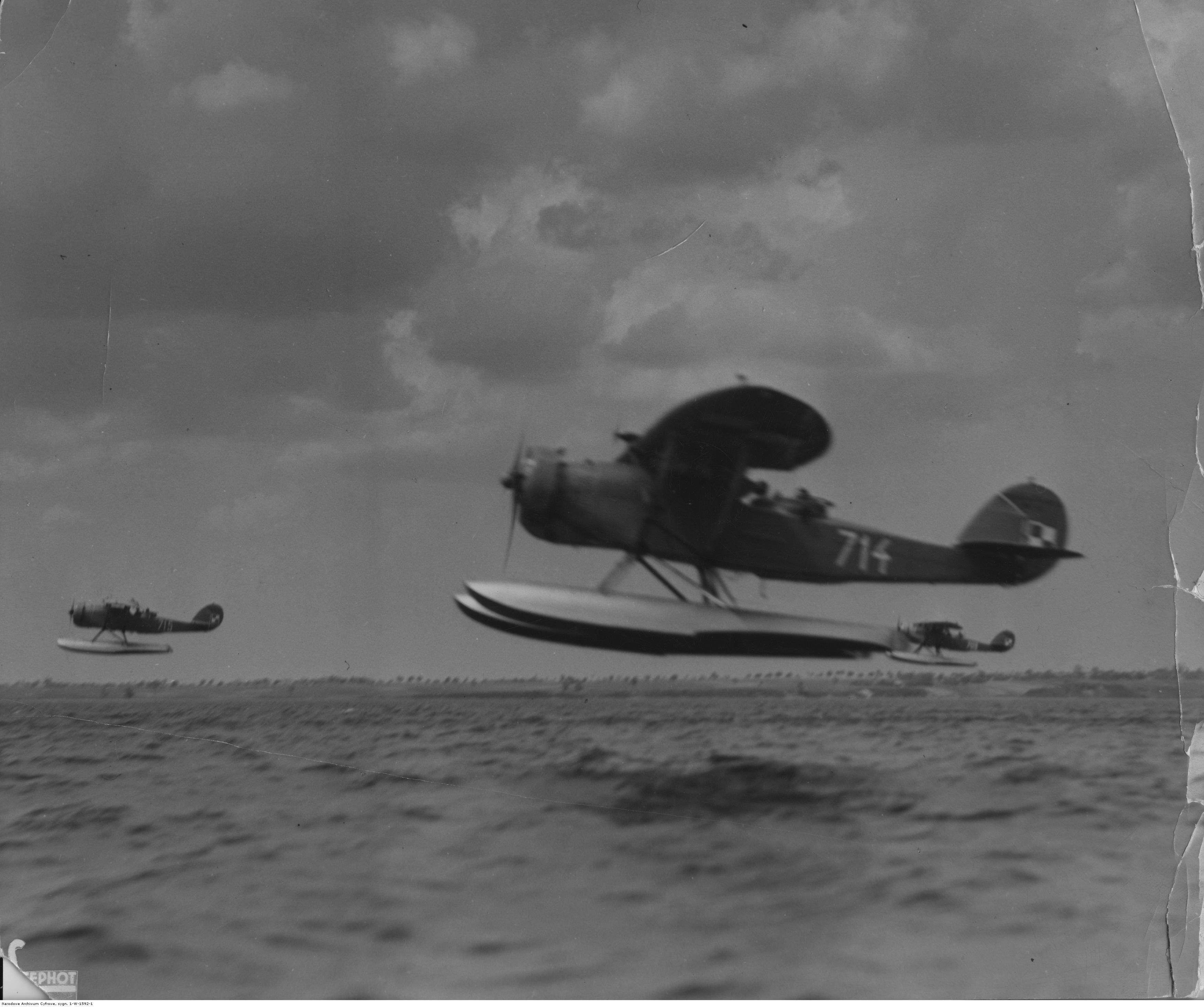 Trzy wodnosamoloty Lublin R-XIII (na pierwszym planie R-XIIIG nr 714, pierwszy z lewej R-XIIIG nr 715) w locie w pobliżu Półwyspu Helskiego.